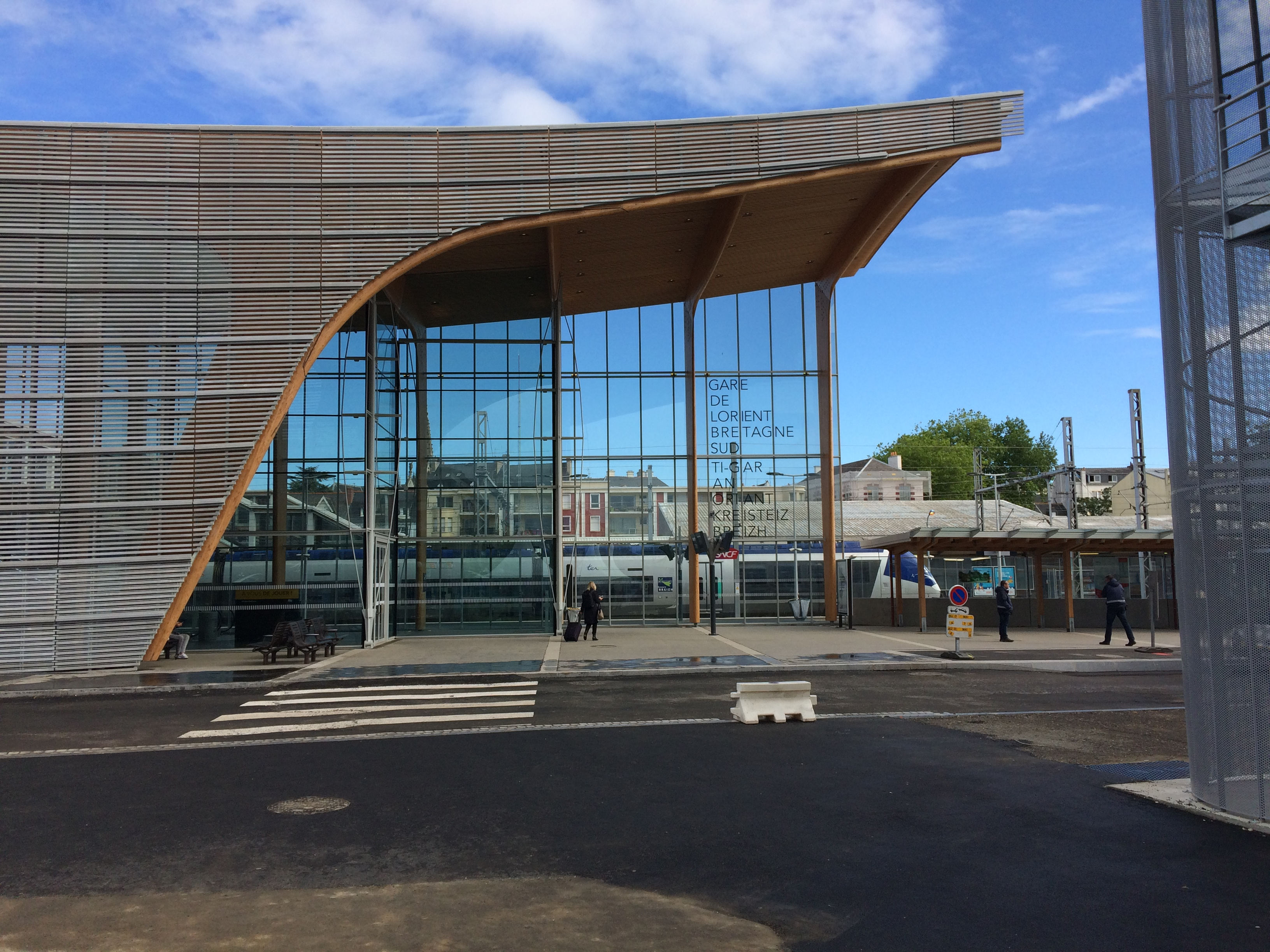 Entrée du nouveau bâtiment de la gare de Lorient situé au sud des voies.